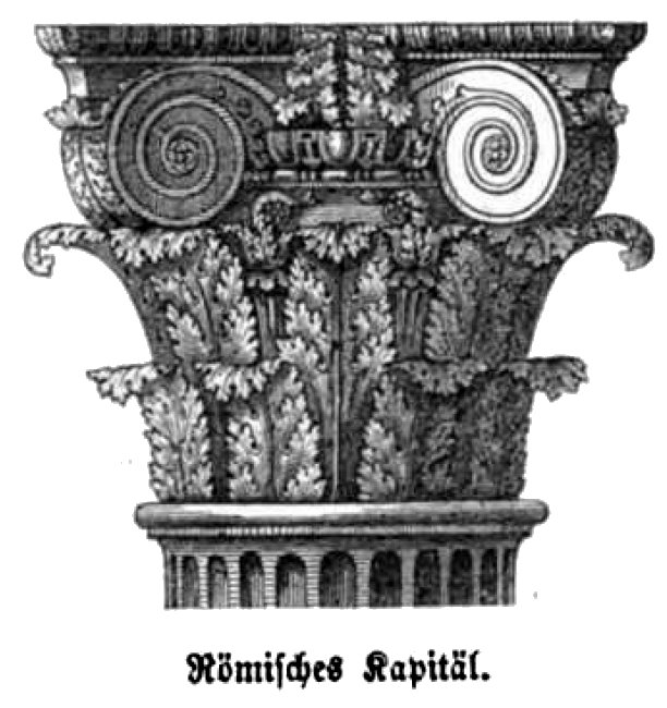 Bild aus Seite 100 in "Die Gartenlaube". Image from page 100 of journal Die Gartenlaube, 1857.